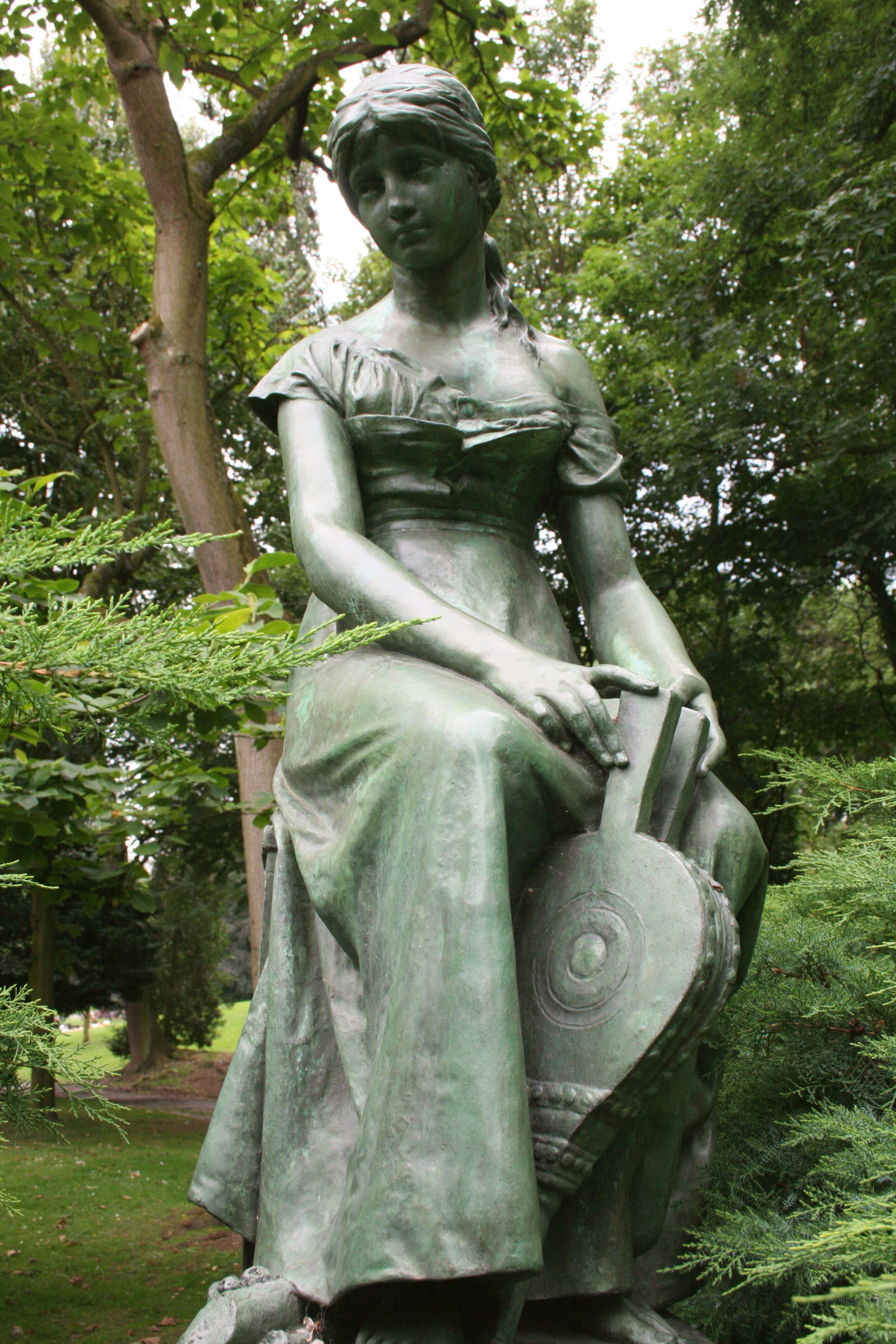 Josaphatpark, Schaarbeek (Brussel), België. Standbeeld Assepoester van Edmond Lefever